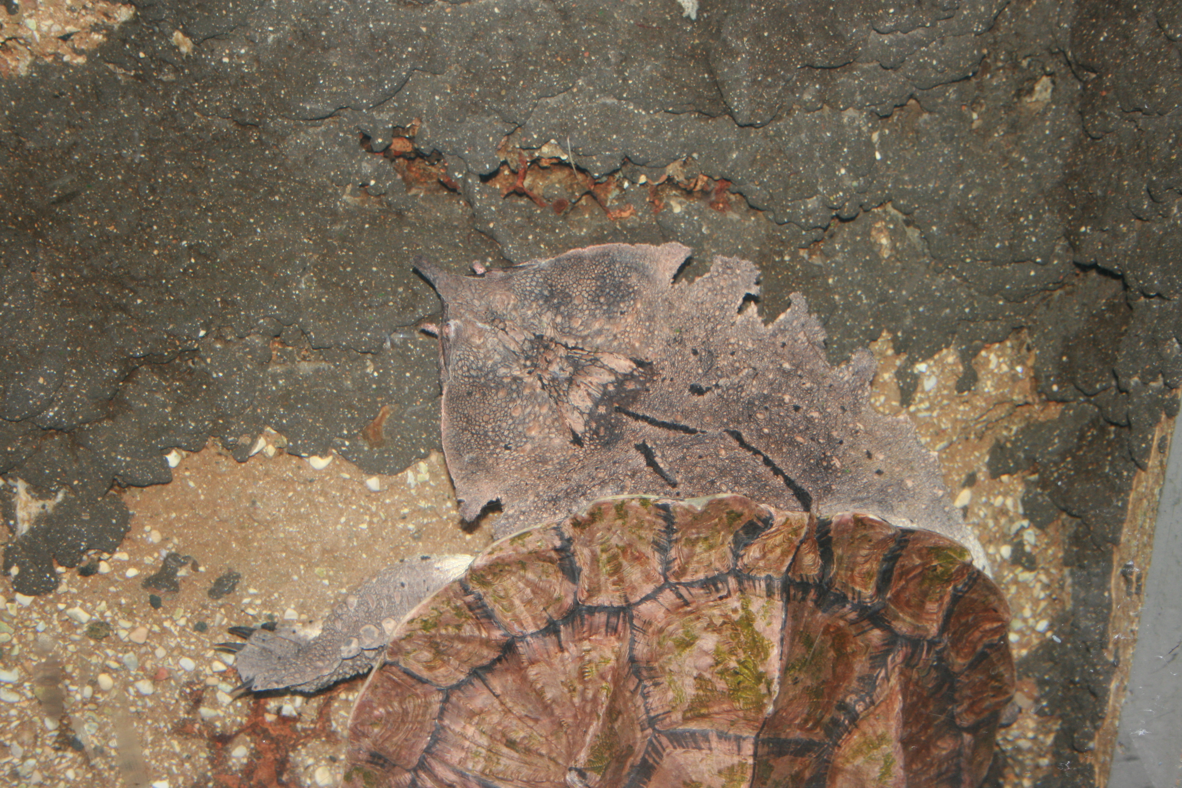 A Mata Mata at Shedds Aquarium.